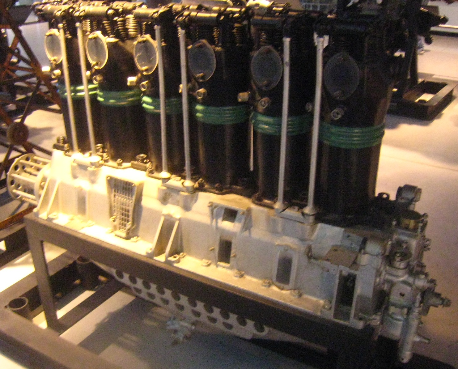 Benz BZ 4S